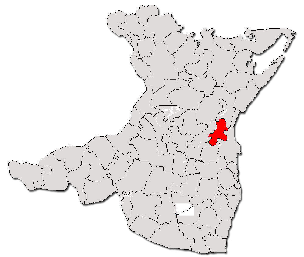 Categorie:Hărţi ale judeţului Constanţa